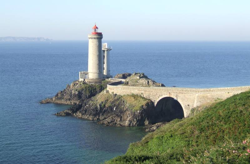 Description: Phare du Petit Minou à Plouzané Source: Pierre Blouch Date: 17 juillet 2006